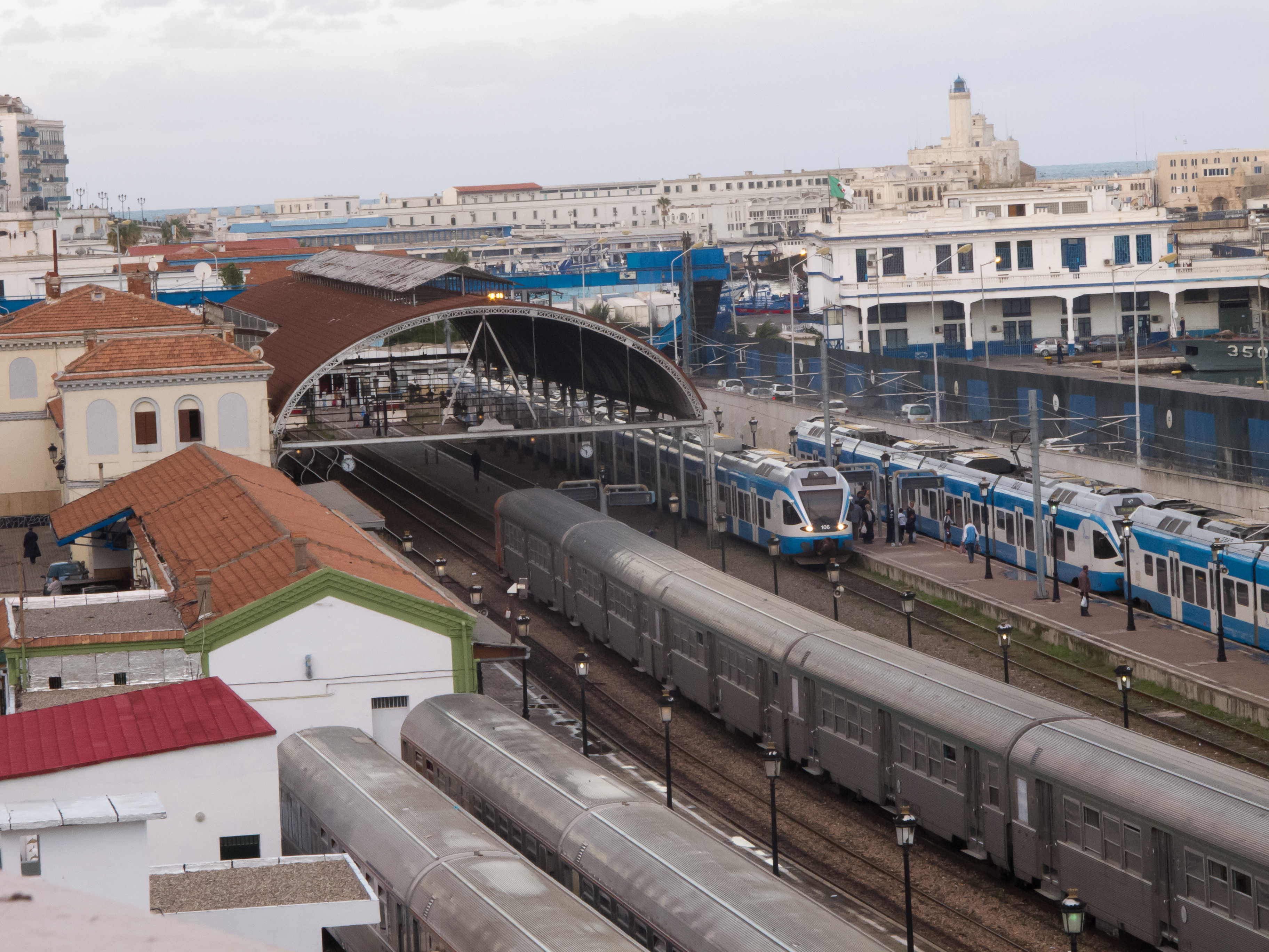 Vue de la gare d'Alger-Centre en octobre 2010 / Alger, Algérie